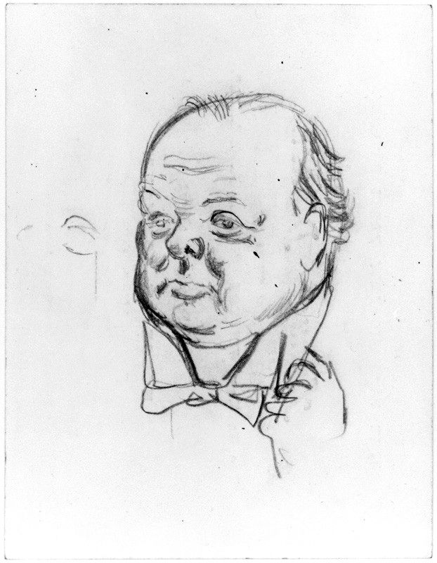 Pencil cartoon 114 mm x 89 mm